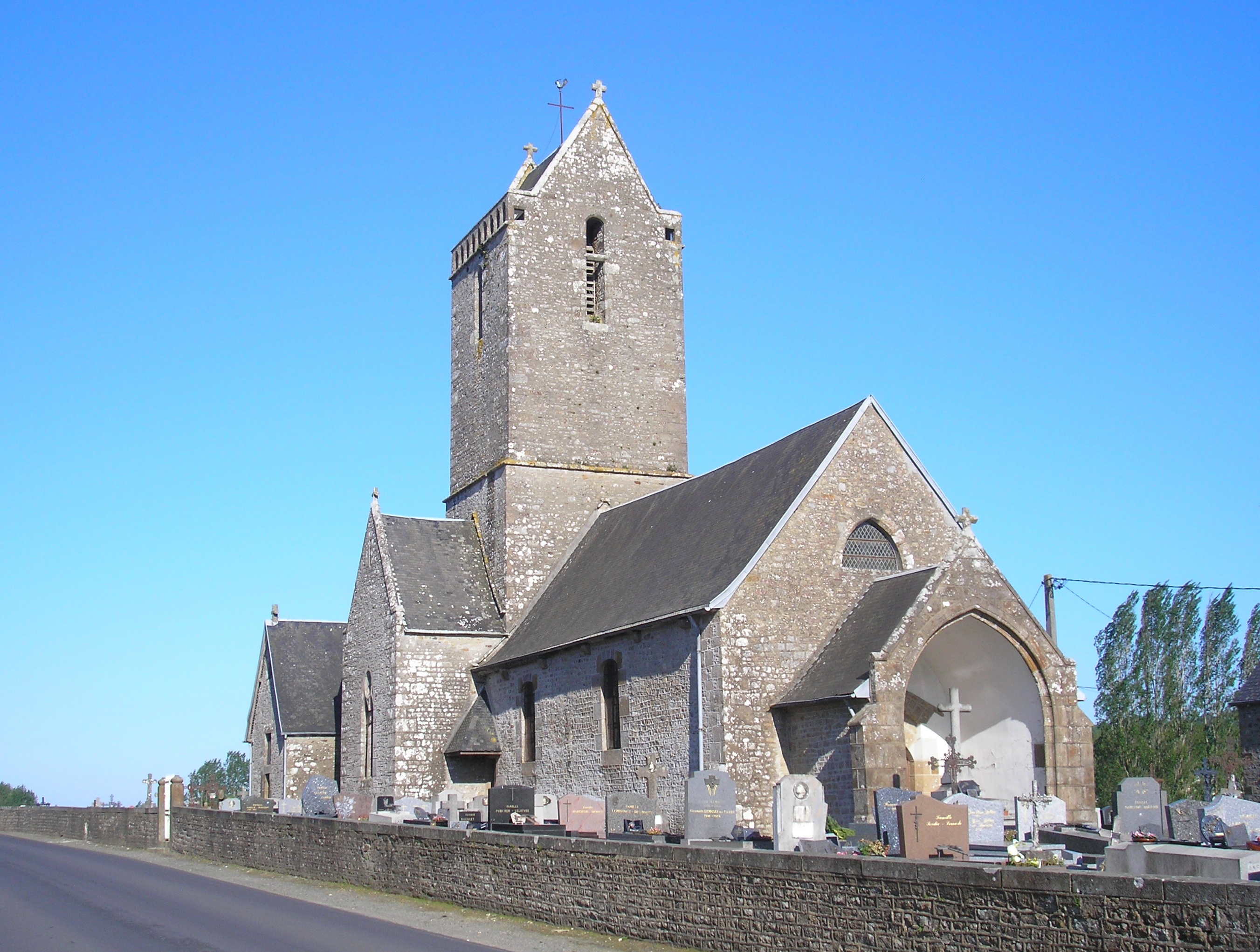 Saint-Jean-de-la-Haize (Normandie, France). L'église Saint-Jean-Baptiste.